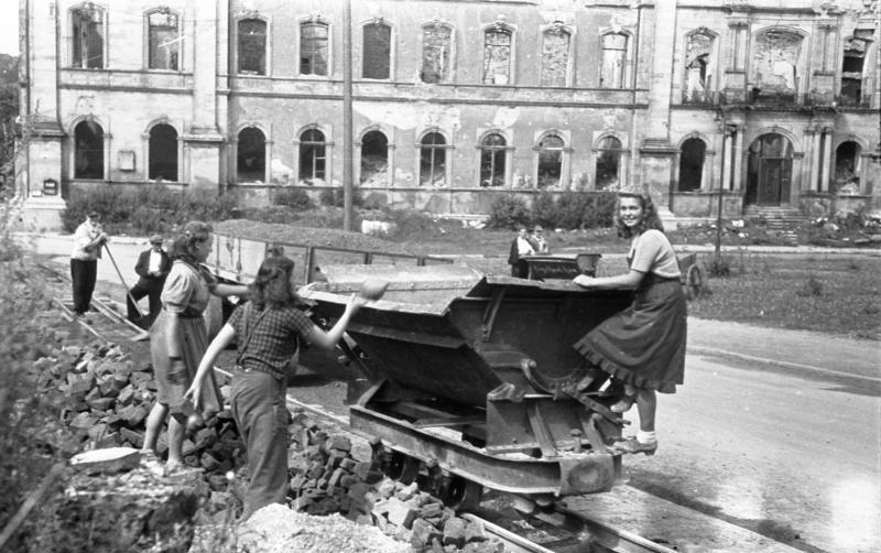 ca.1946/1947 Mainzer Studenten helfen beim Wiederaufbau in Zweibrücken. Auf der Lore eine Zweibrücker Schülerin namens Leni Leonhardt.